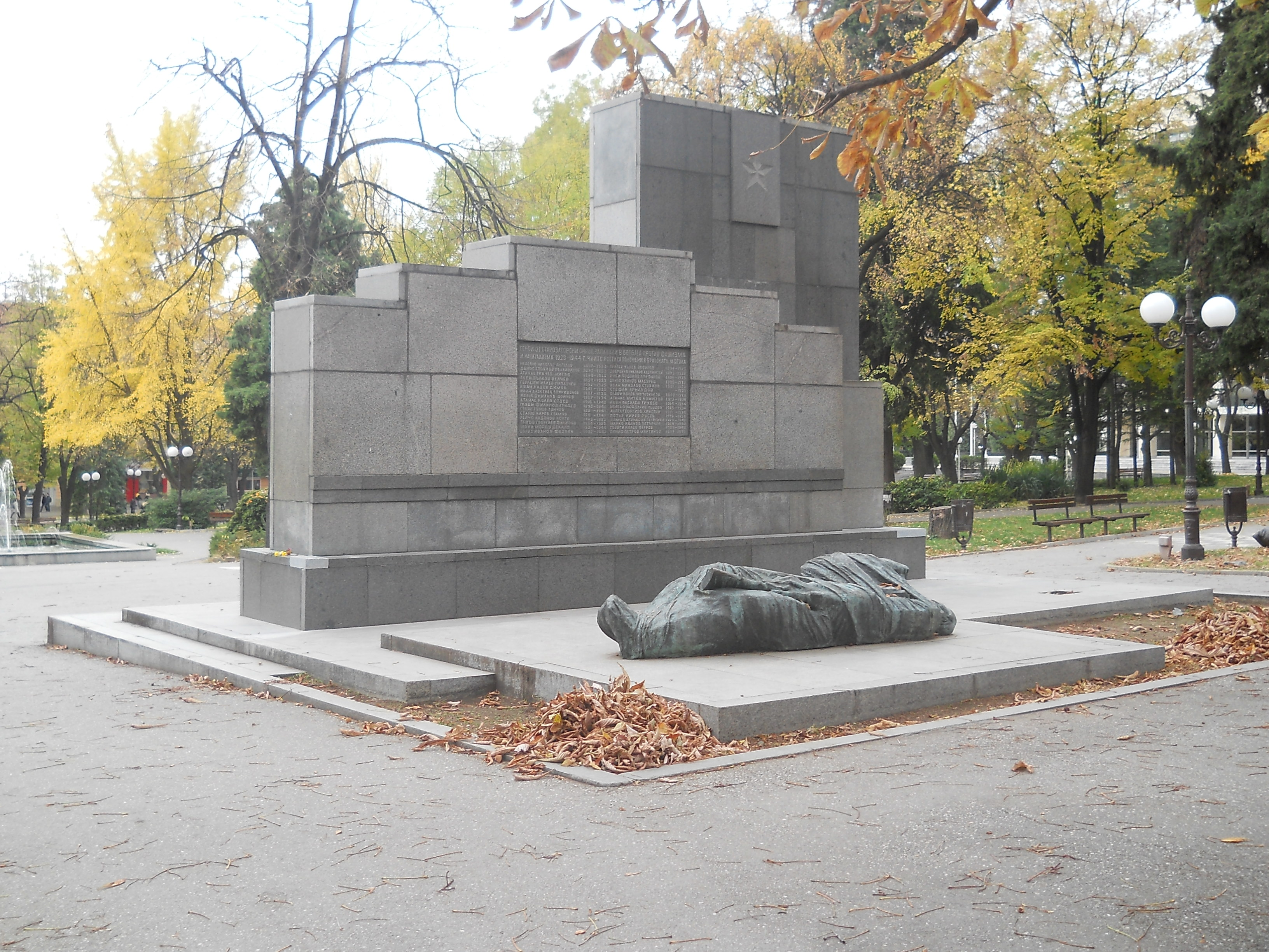 Паметник на антифашистите в Стара Загора, България